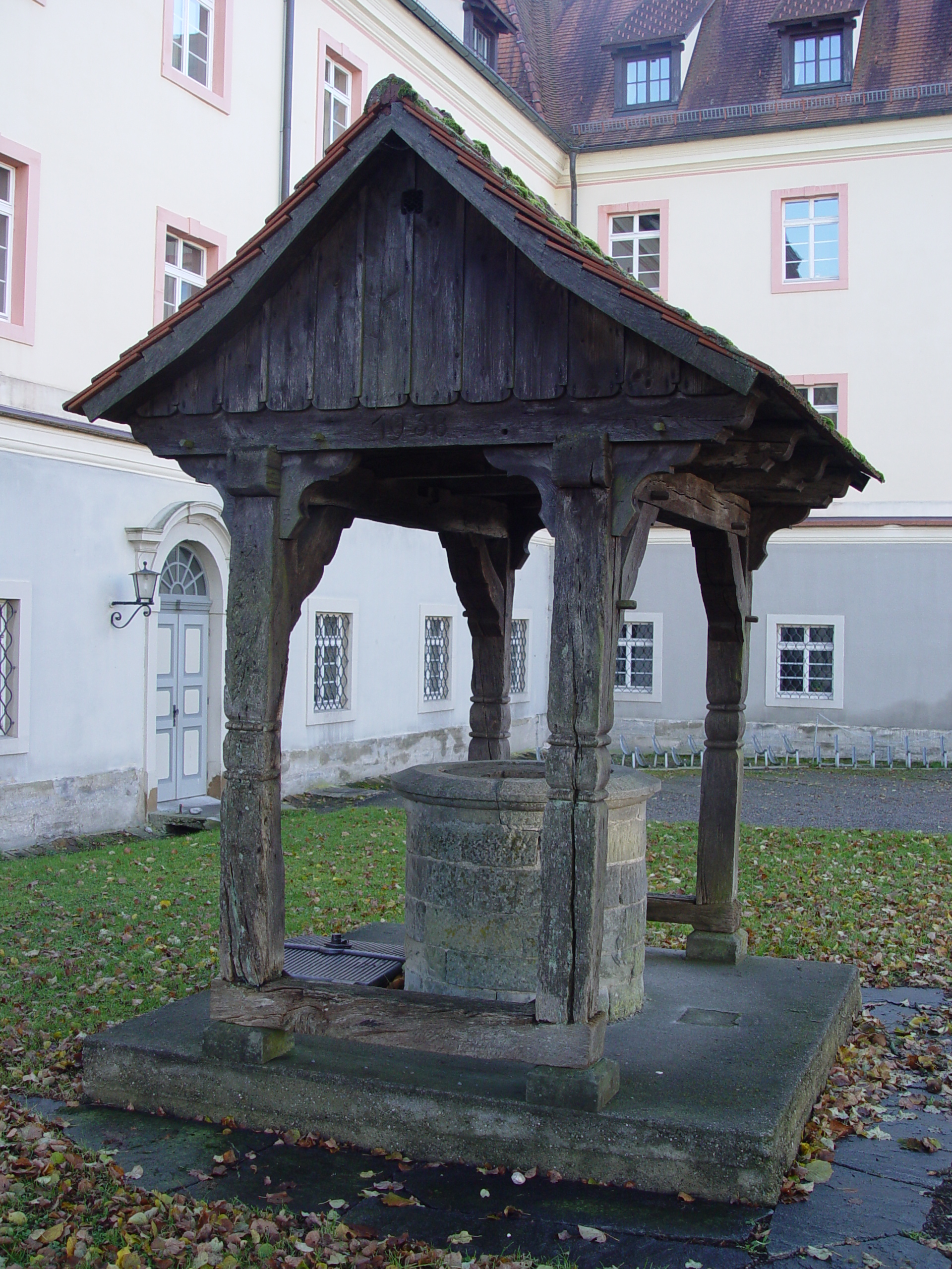 Brunnen im Hof von Kloster Wald